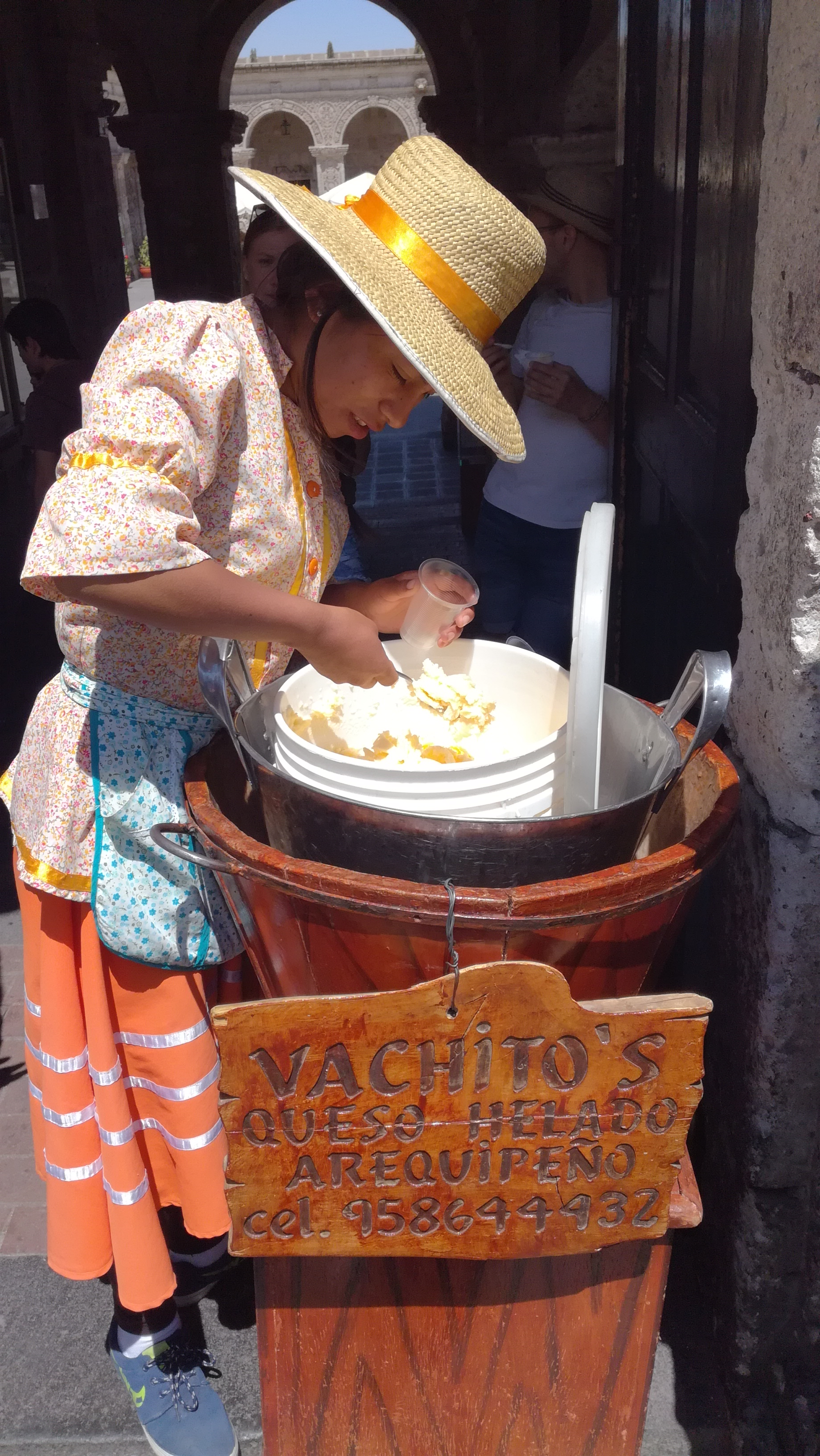 dav